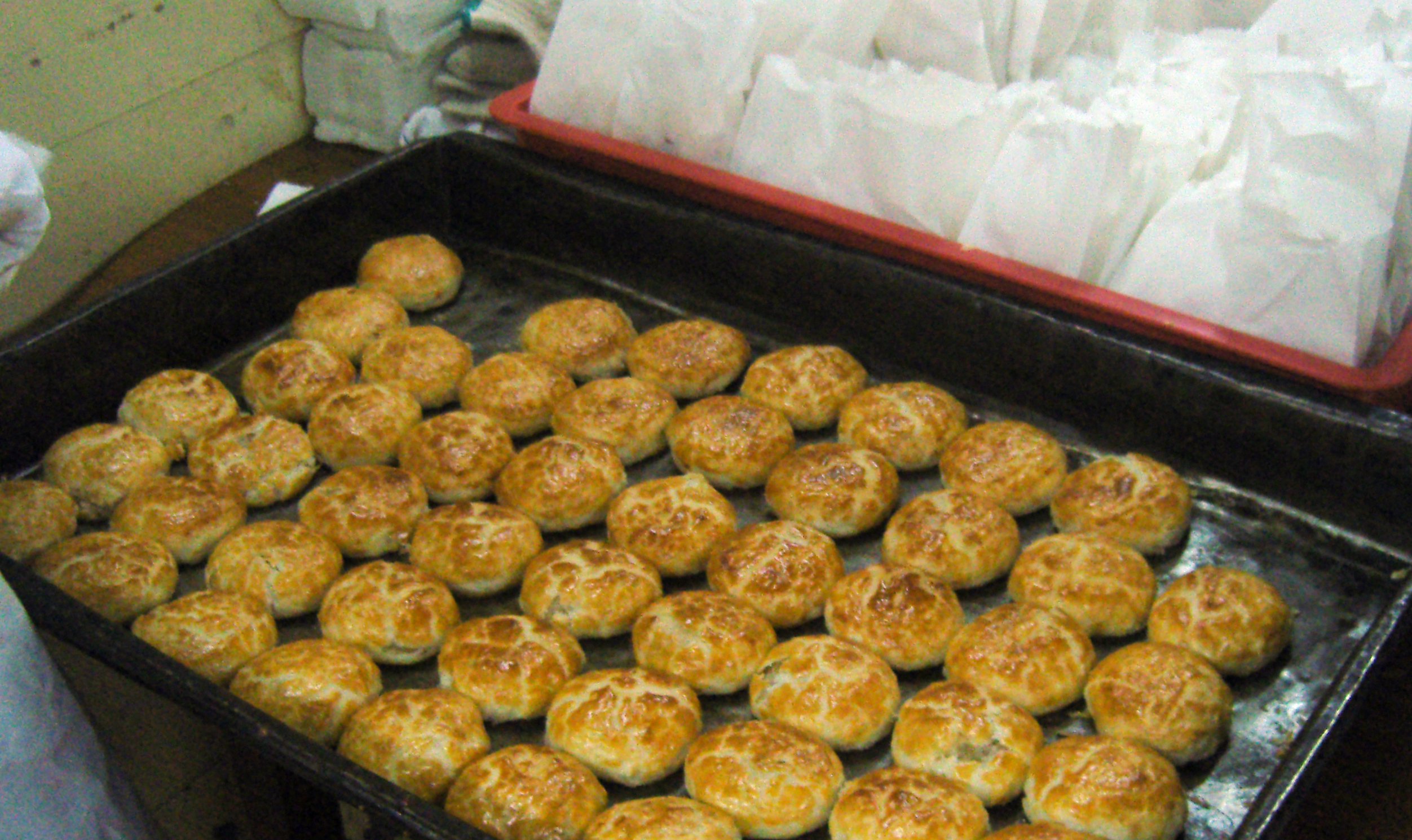 恒香工場的老婆餅